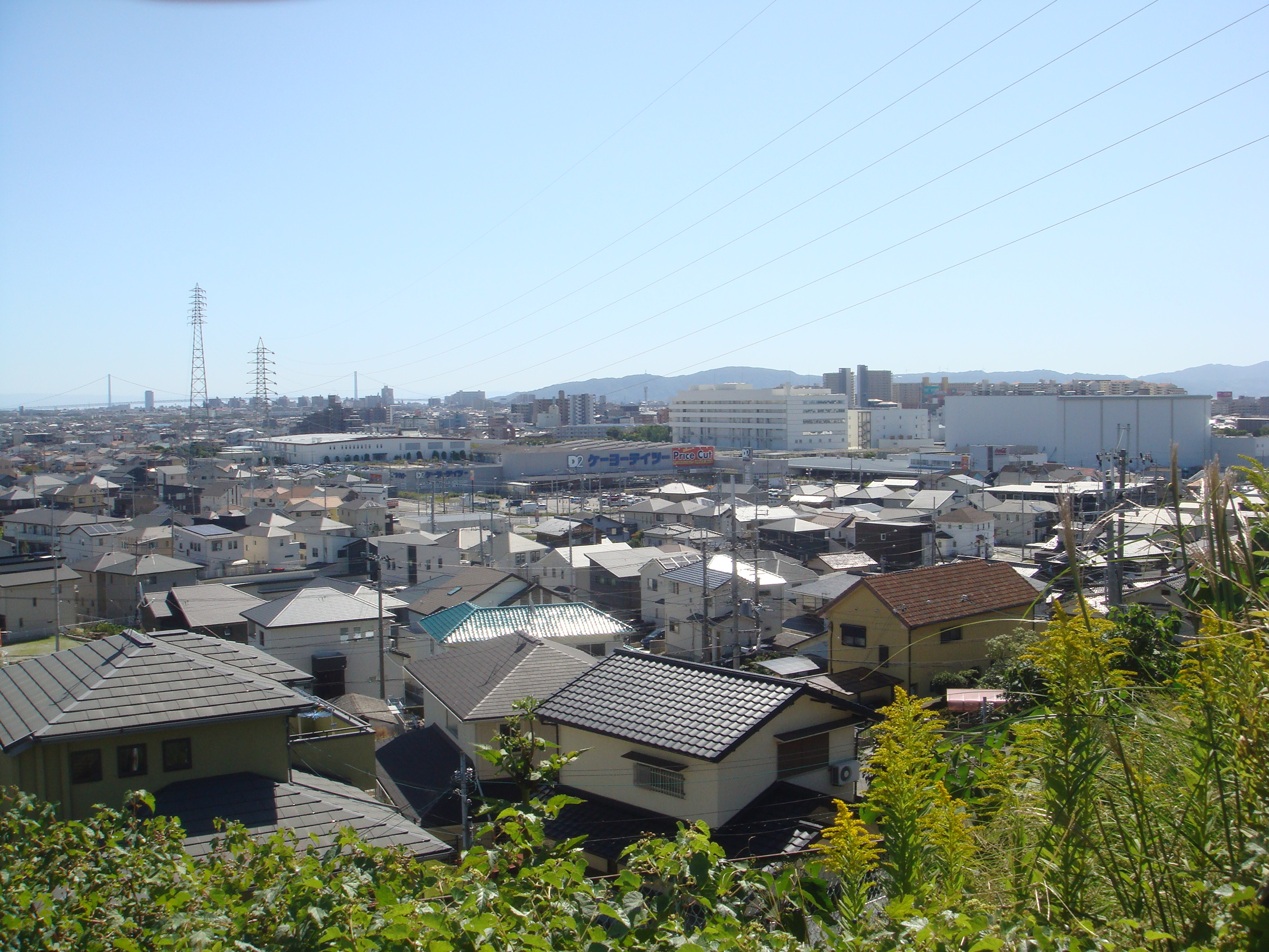 緑が丘(明石)淡路島を望む